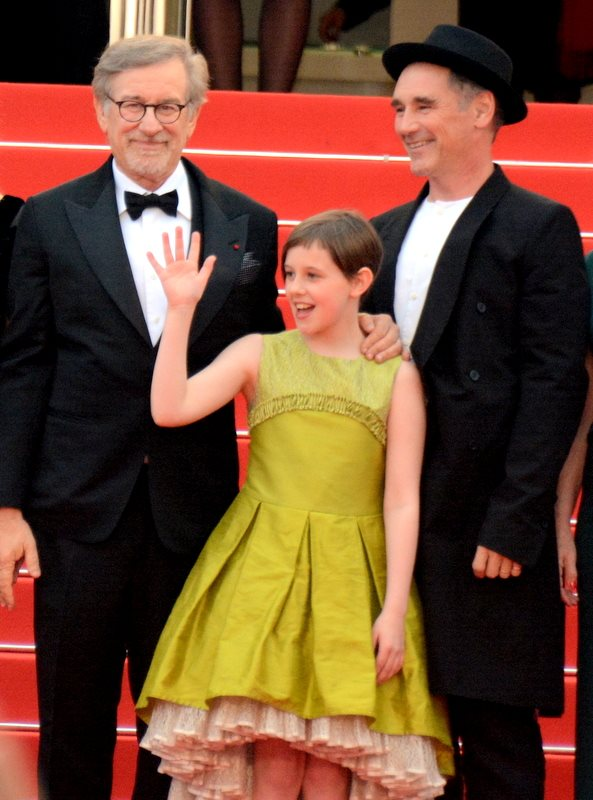 Présentation du film "Le Bon gros géant" au festival de Cannes